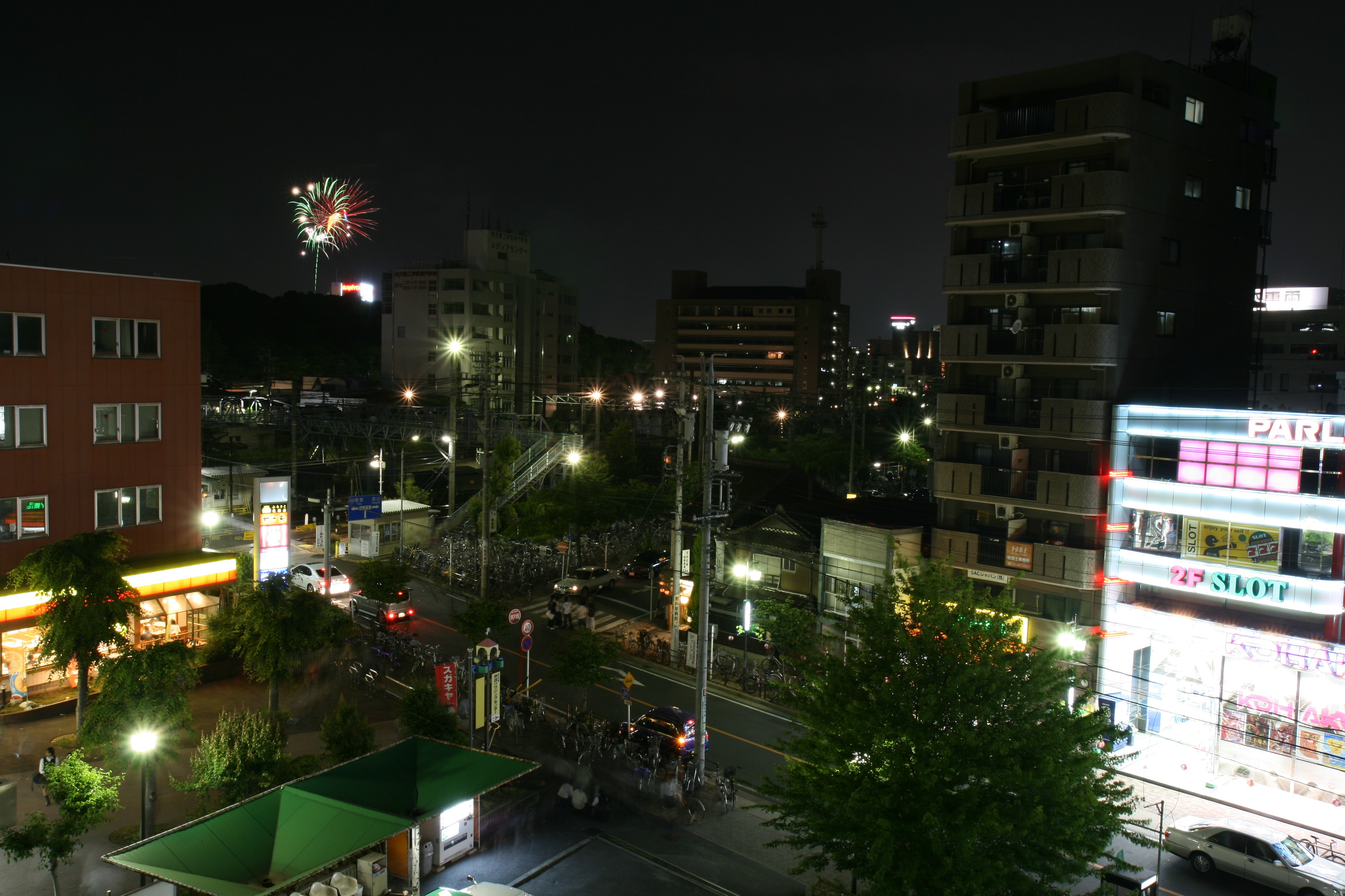 熱田の花火 (愛知県名古屋市熱田区三本松町)